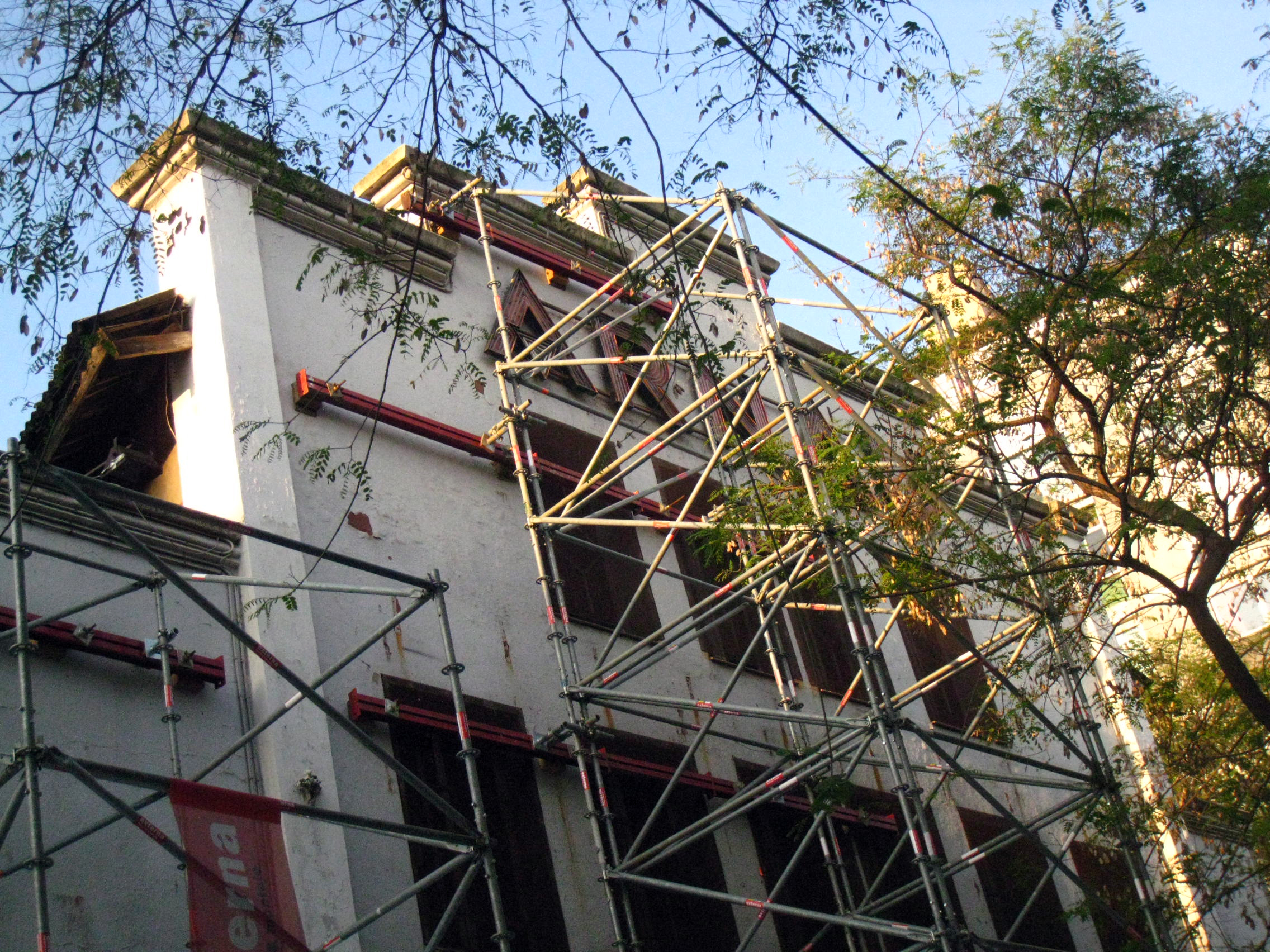 Teatre Arnau (Barcelona) Object location41° 22′ 30.82″ N, 2° 10′ 12.38″ E